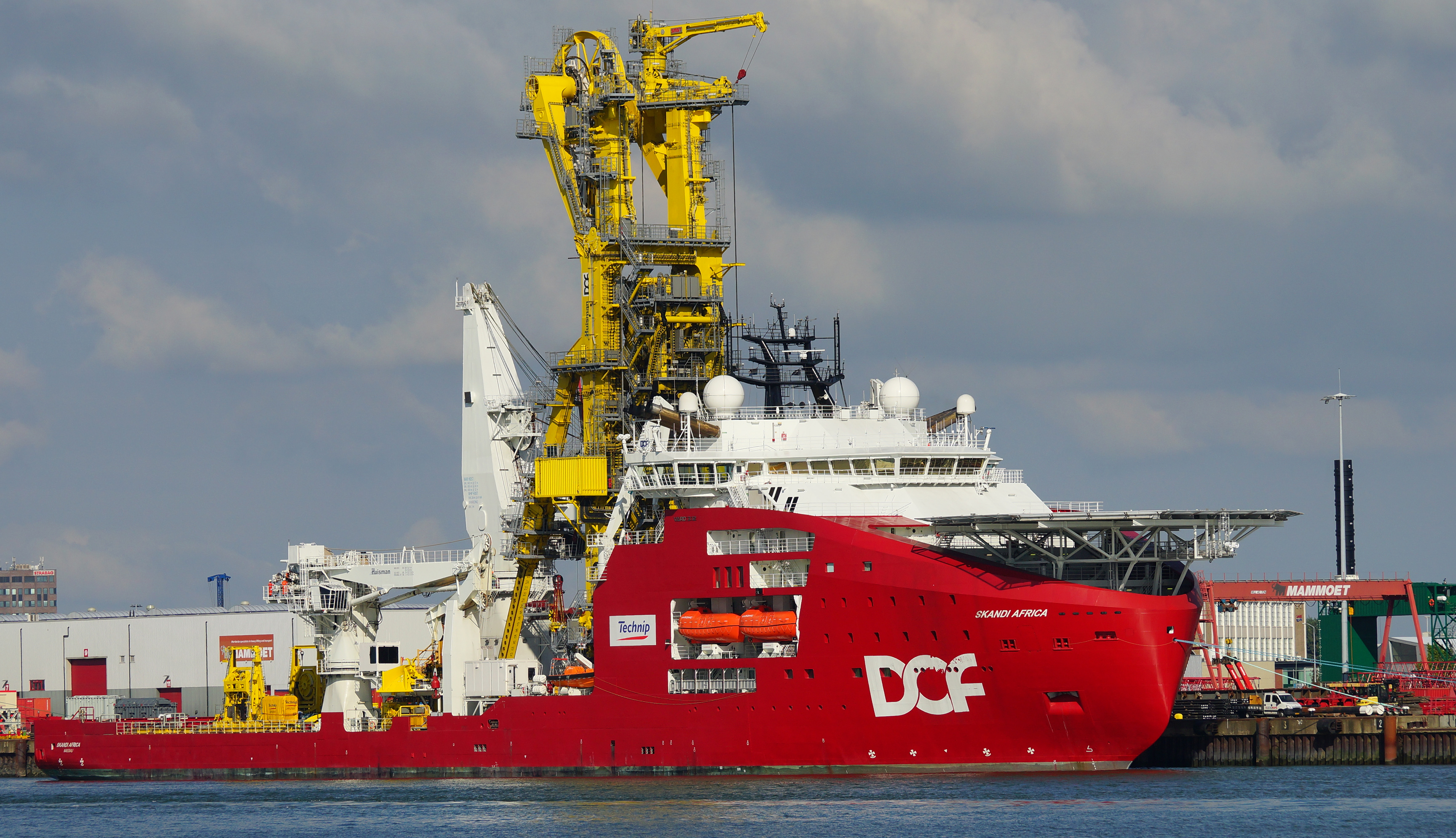 Nieuwe Maas t.h.v Schiedam 18-9-2016